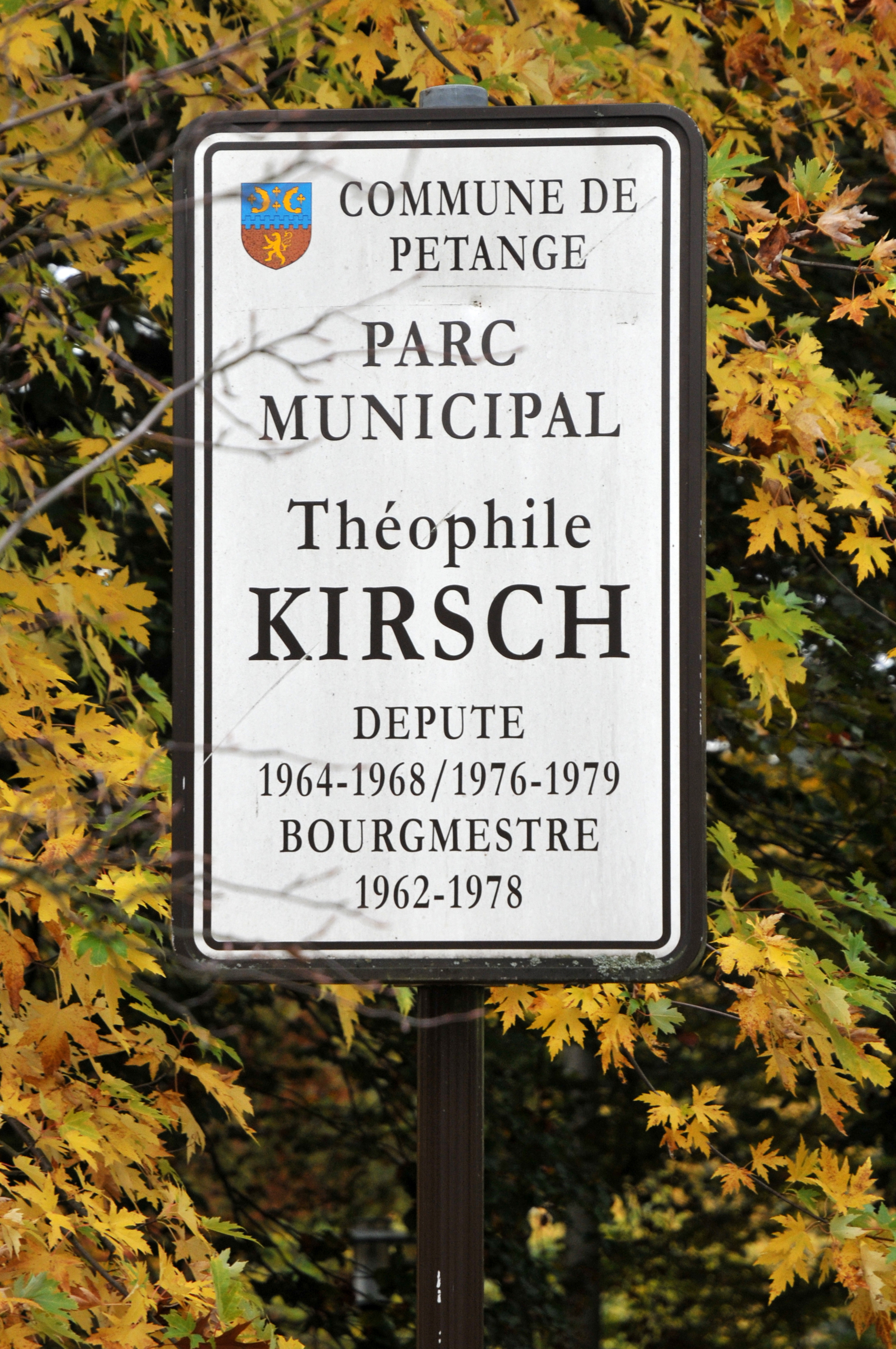 Parc municipal Théophile Kirsch zu Péiteng.